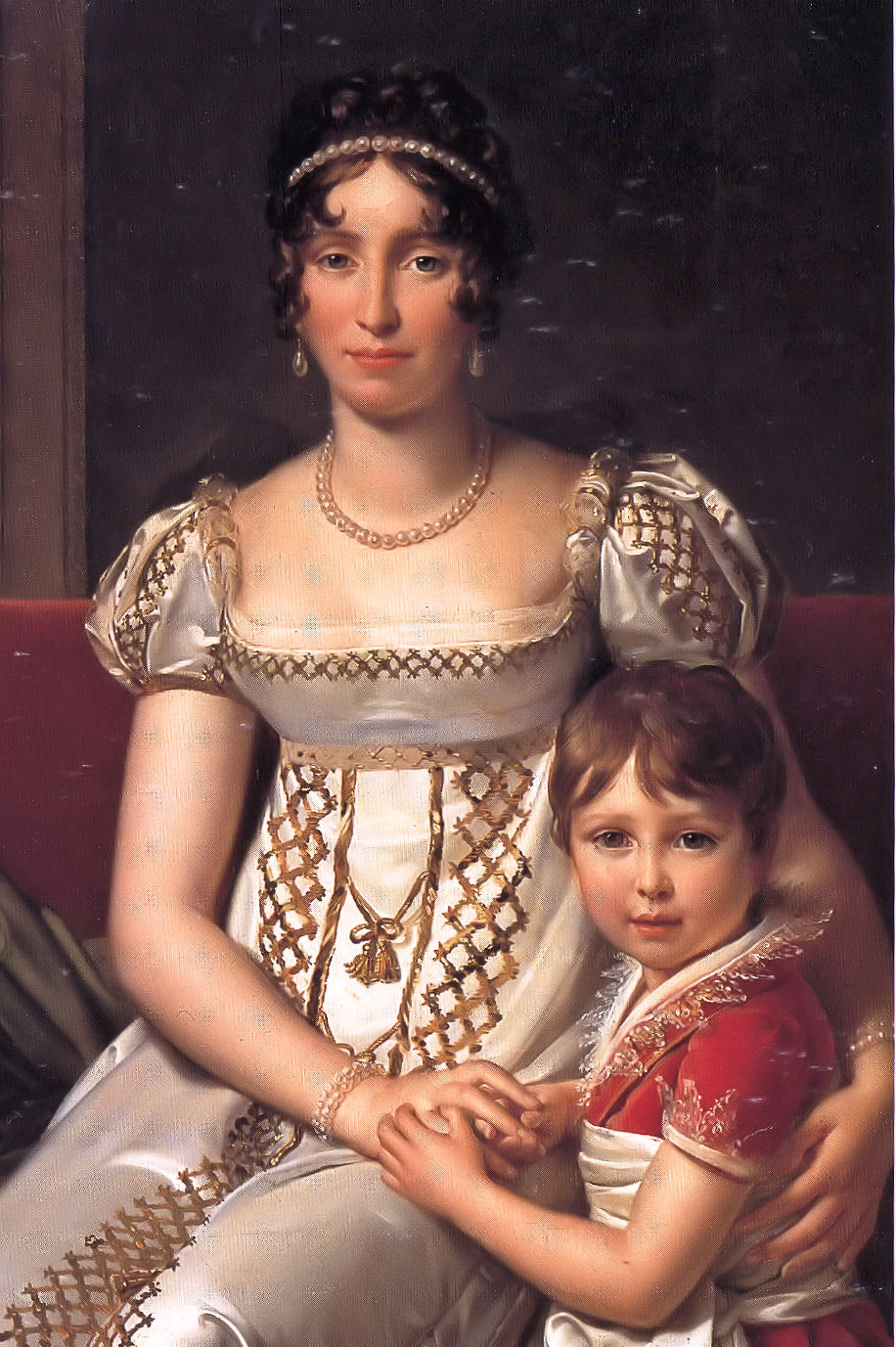 detail